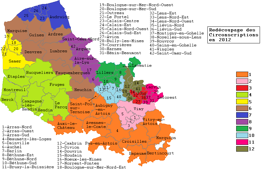 Circonscriptions du Pas-de-Calais en 2012.